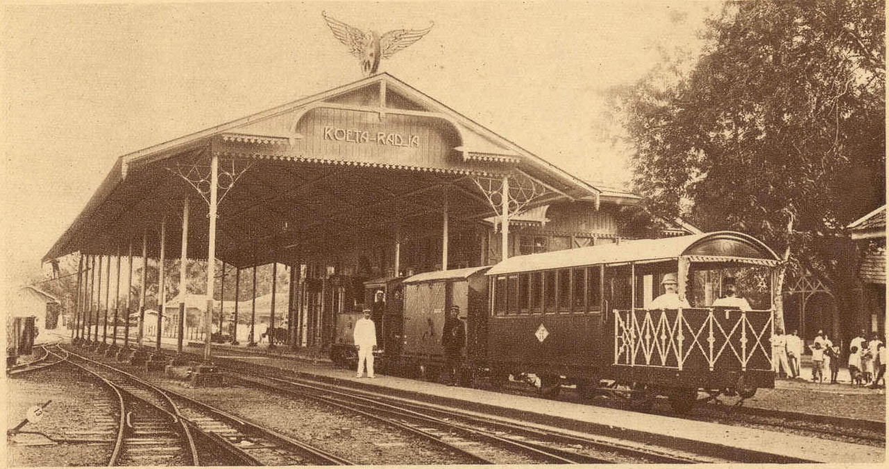 Stasiun Kuta Raja (Banda Aceh) adalah stasiun pusat dari perusahaan kereta api "Atjeh Tram".